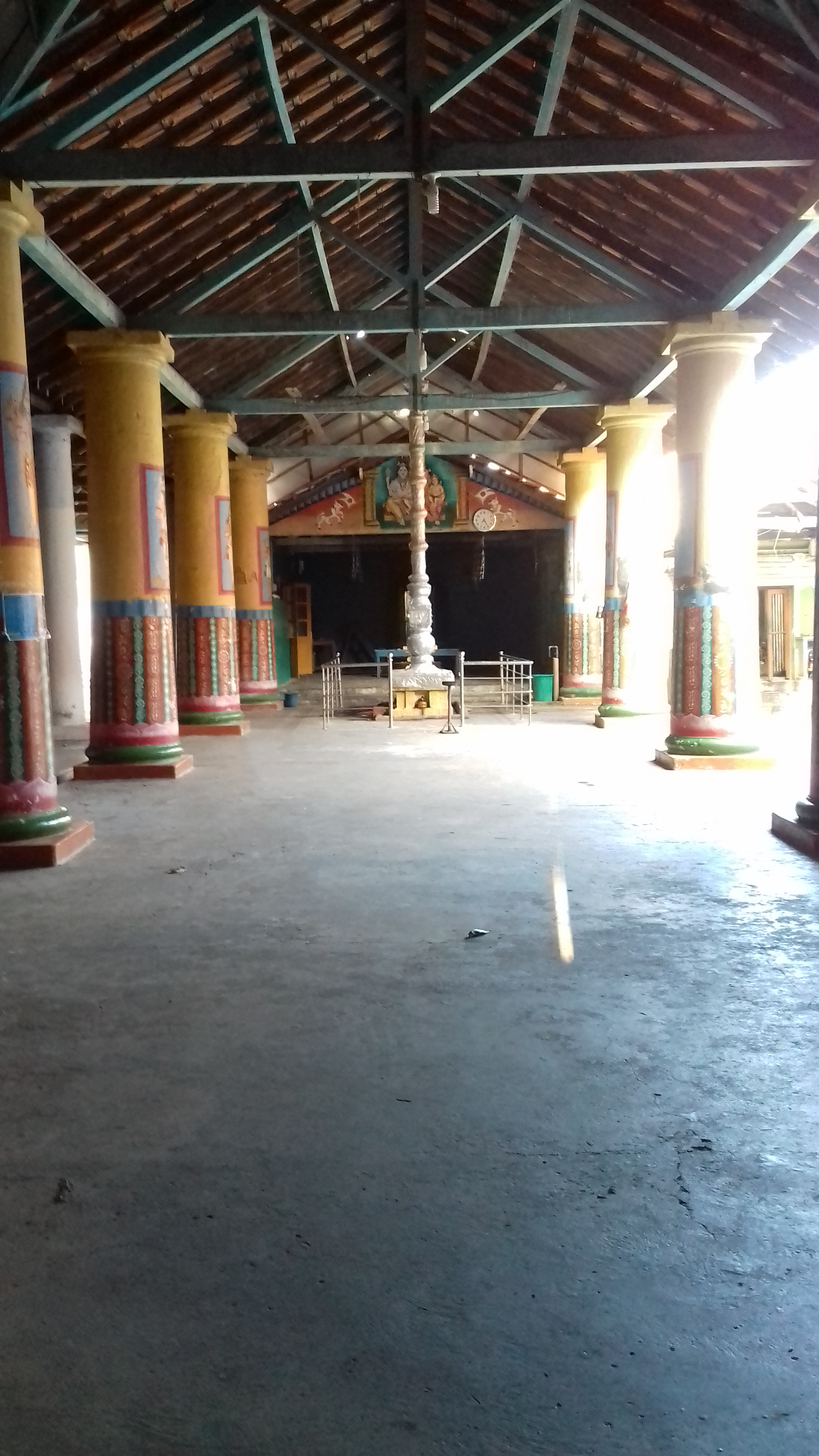 அராலி ஸ்ரீ விசாலாக்ஷி சமேத விஸ்வநாதேஸ்வரர் தேவஸ்தானம்